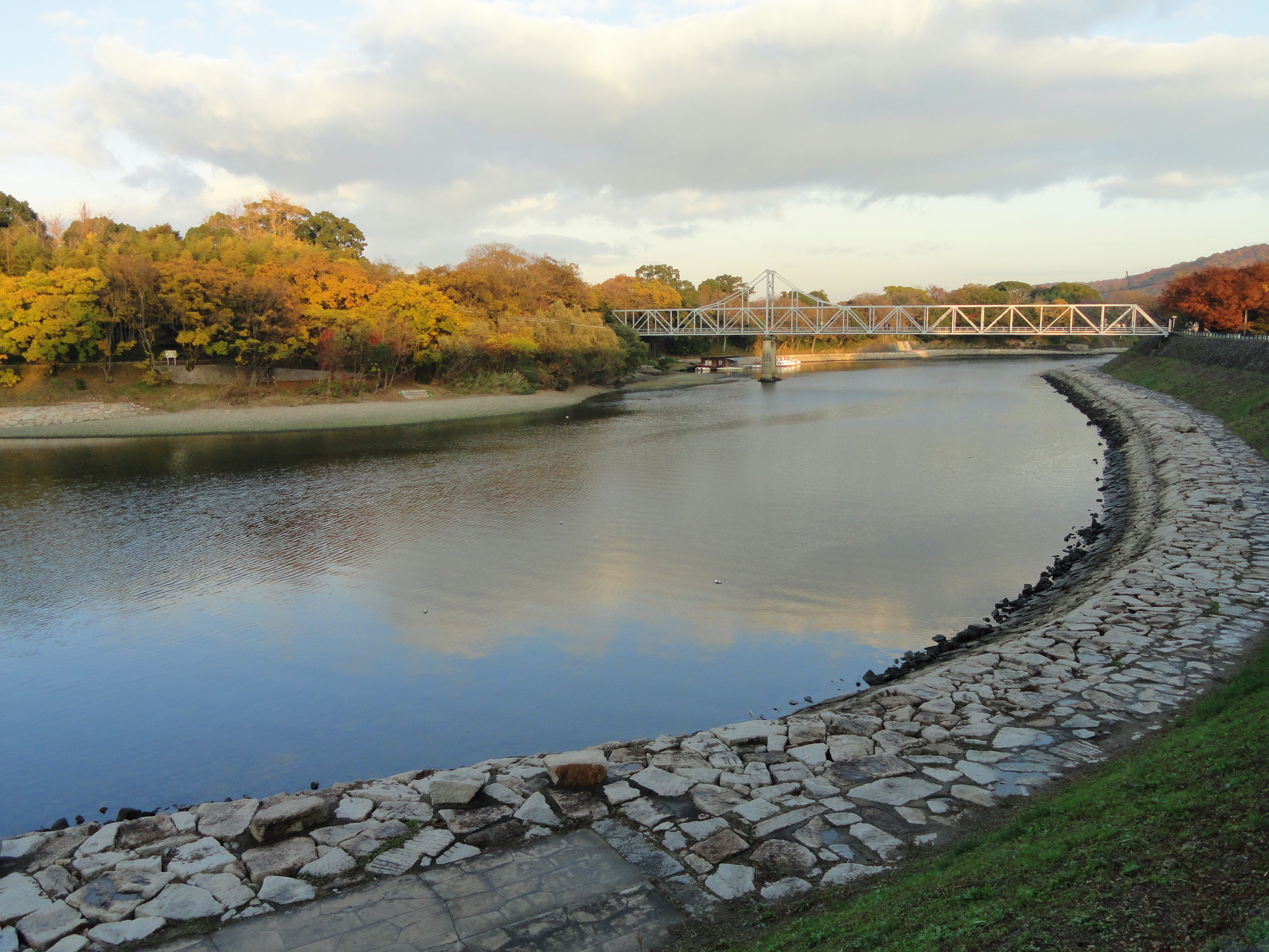 Asahi River, Okayama City, Okayama, Japan.